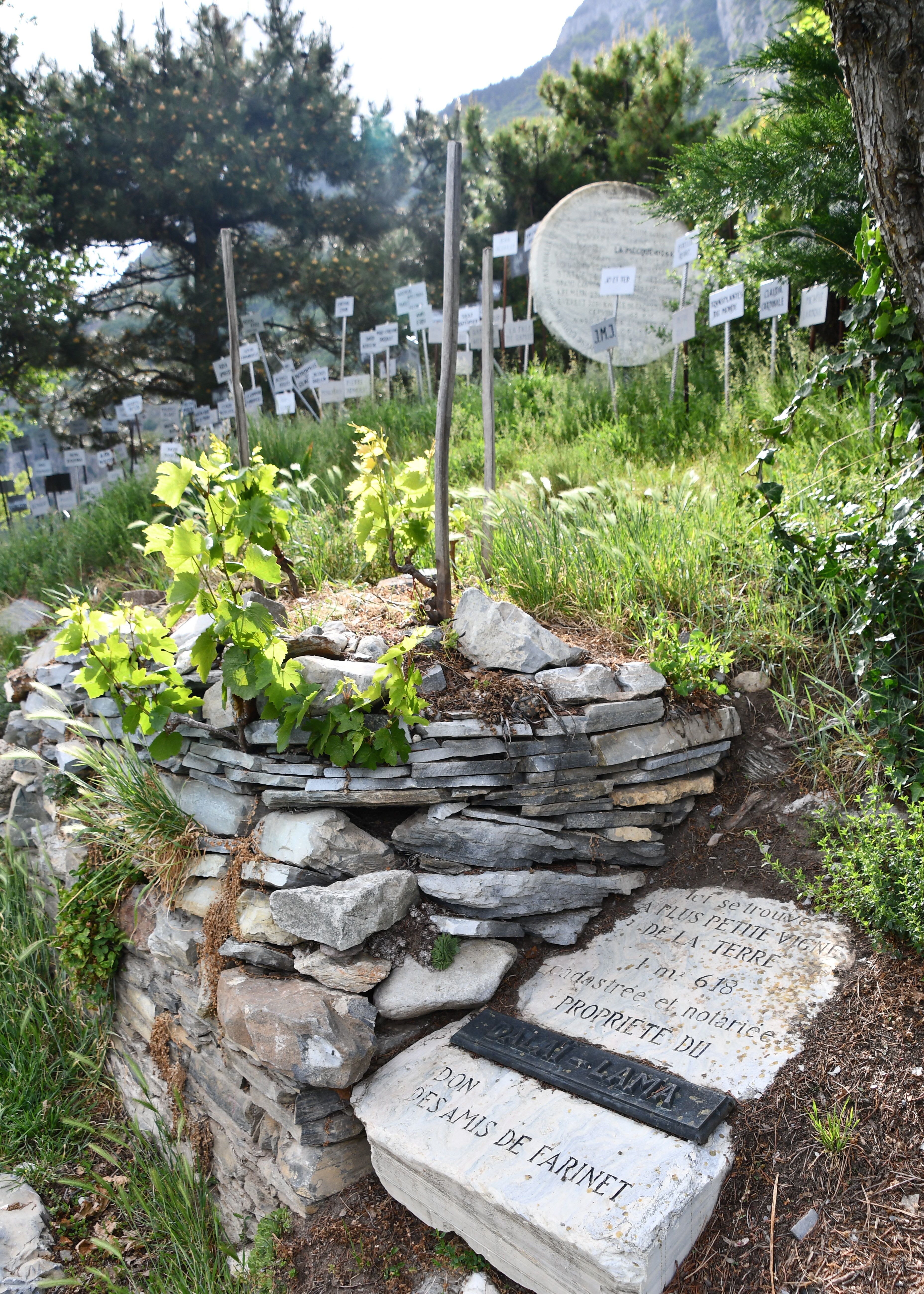 La vigne à Farinet à Saillon (VS), en Suisse.